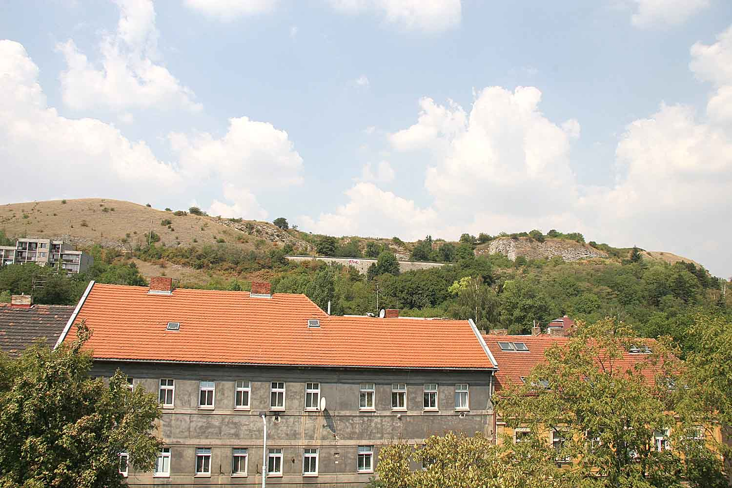 Návrší Děvín od kostela ve Zlíchově autor:Zp